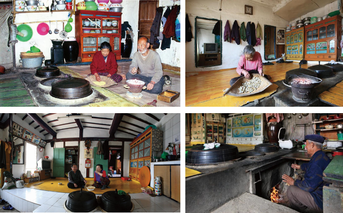 2000년대 연변지역 조선족 주거형태